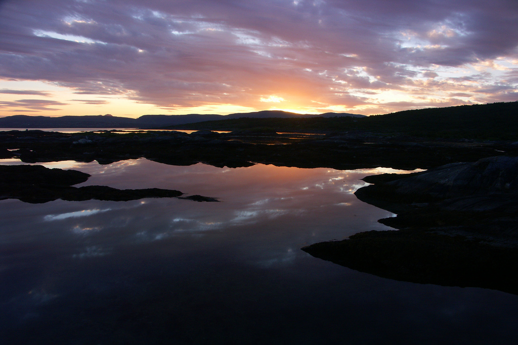 Saltfjorden